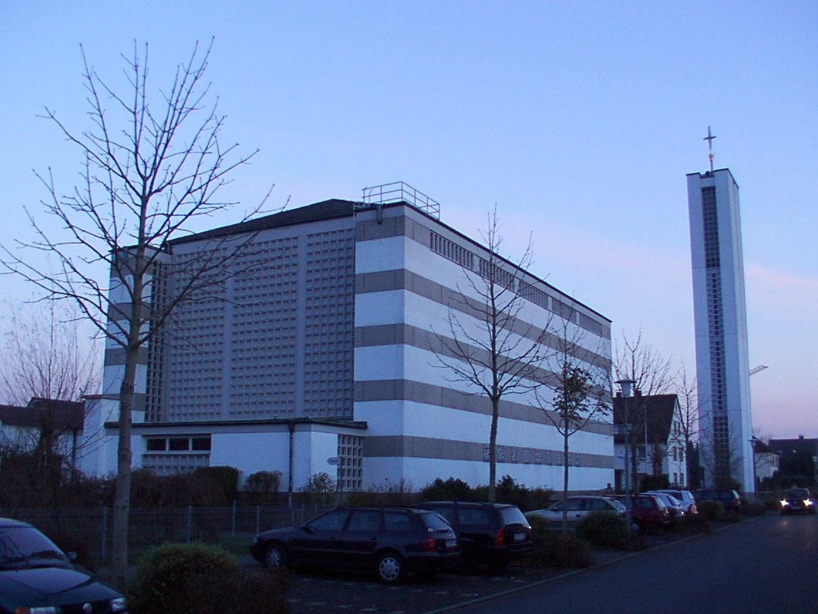 Bad Lippspringe: Katholische Kirche Sankt Marien